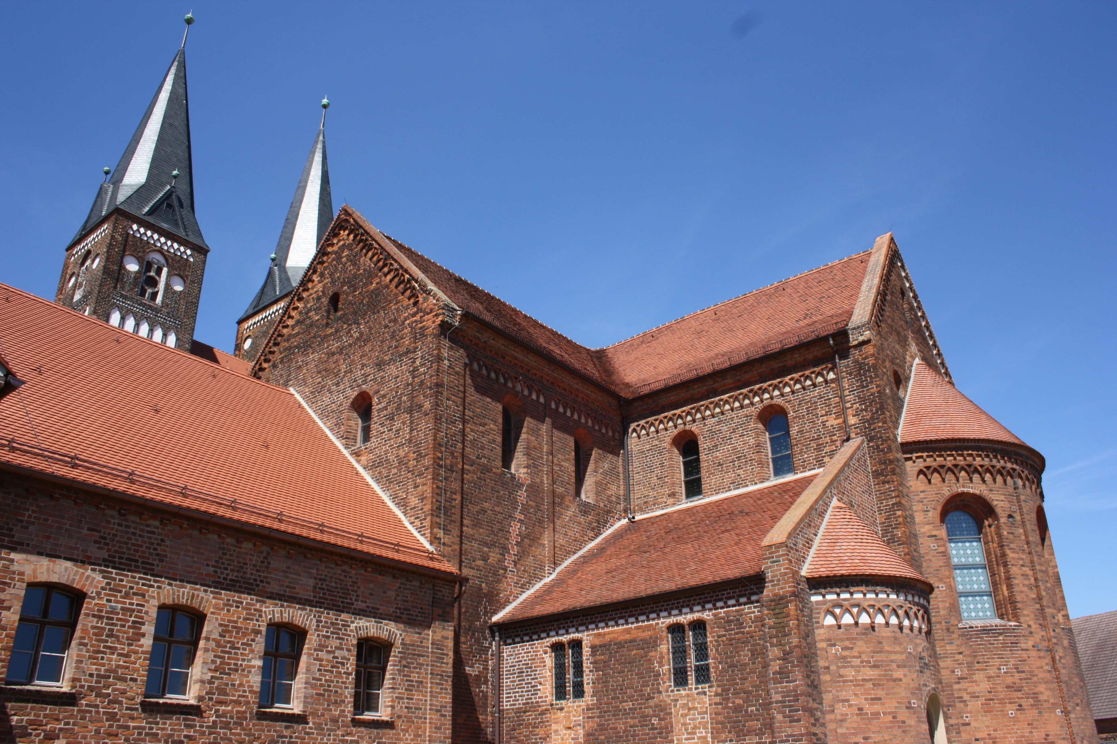 Kloster Jerichow Backstein Romanik 1149